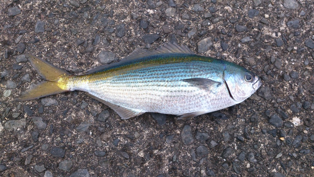 2014年7月 神津島